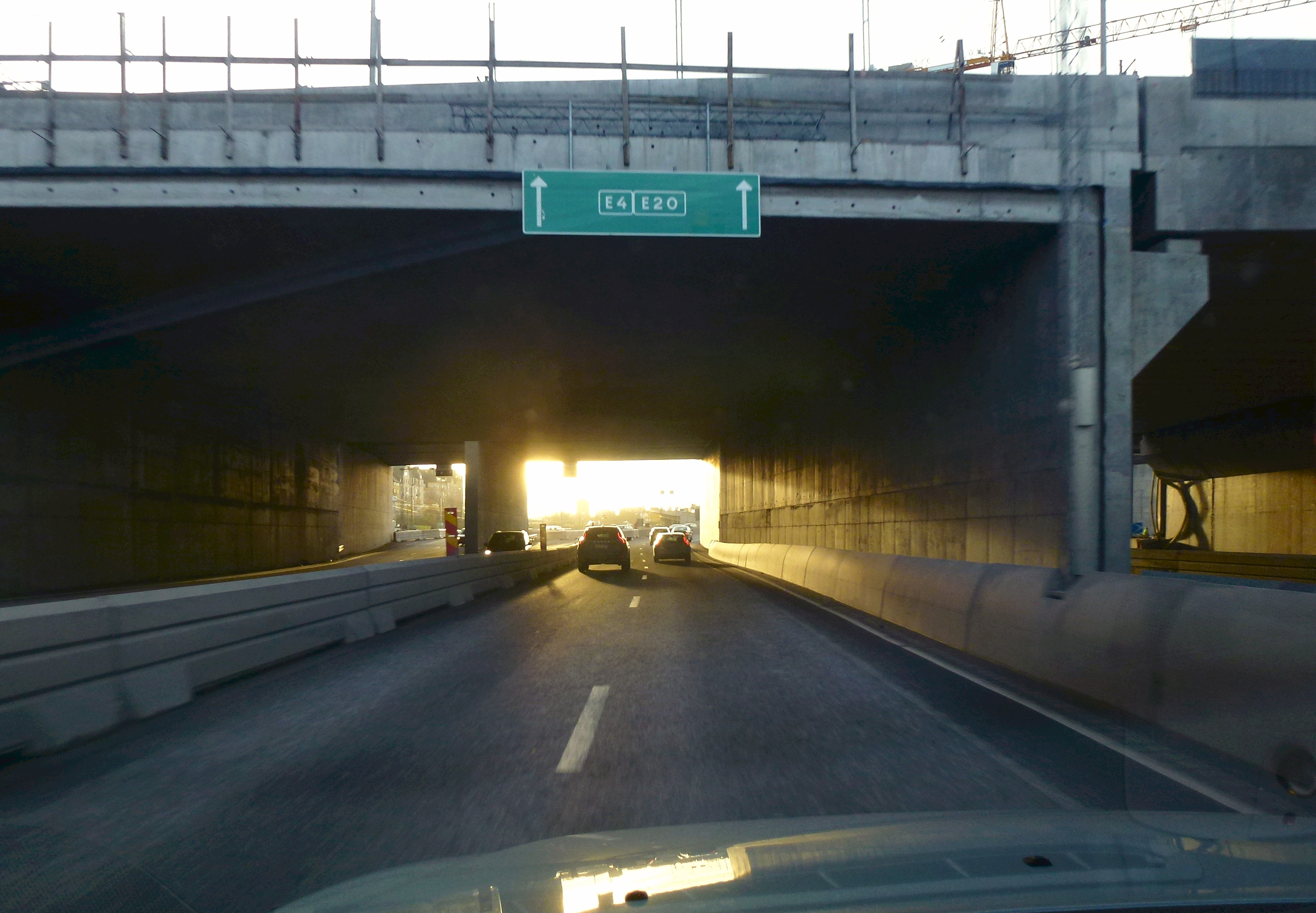 Solna bron, Norra läken, vy mot väst